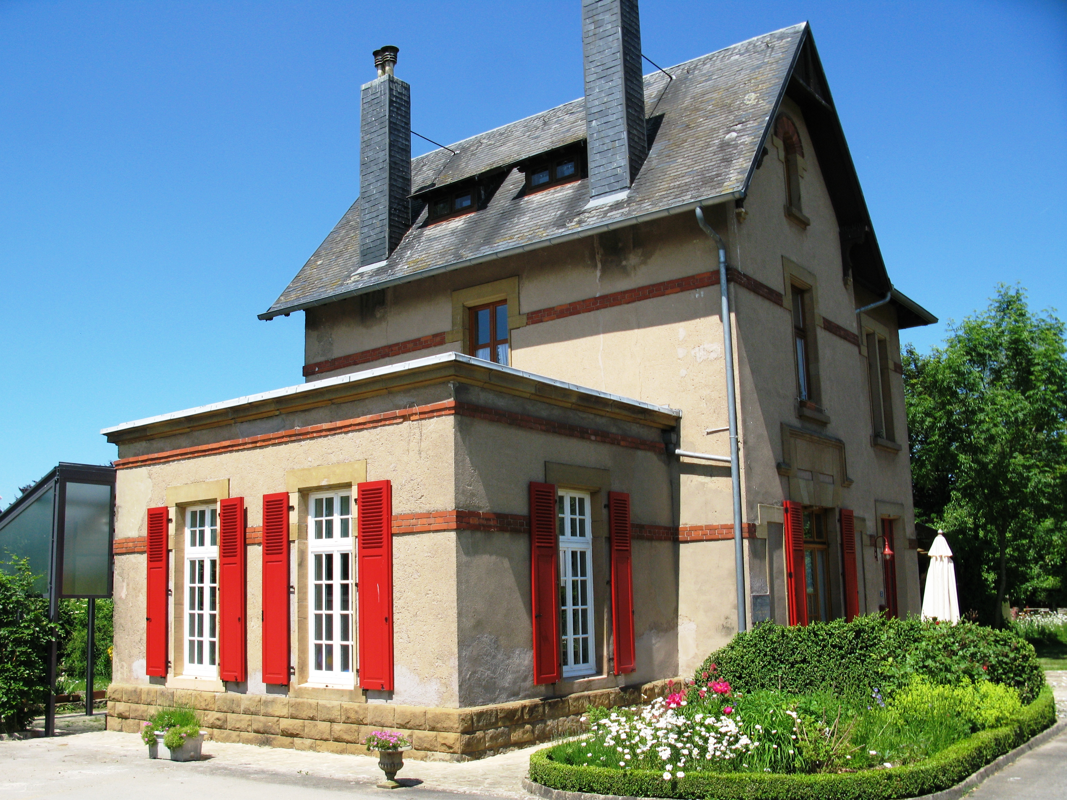 D'Jangeli's Gare zu Näerden am Juni 2009.